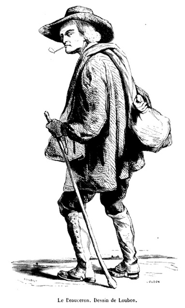 Le Beauceron, dessin de Loubon.